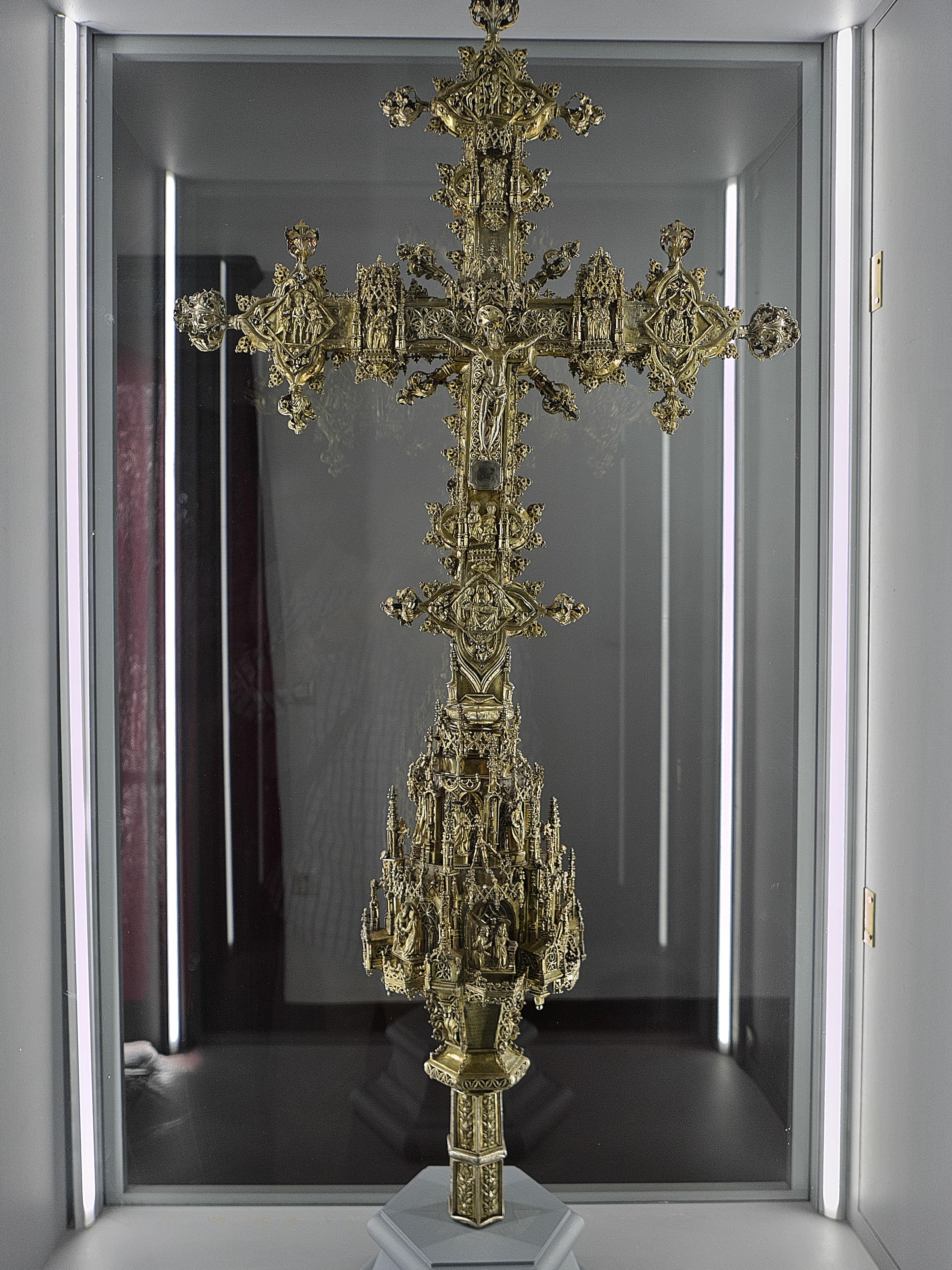 Juan Téllez-Girón, el Santo, consejero de Carlos I de España, humanista y mecenas de la cultura, vinculado a la corte en Valladolid (1531), aportó esta importante pieza de orfebrería, cincelada y repujada, a su Colegiata de Osuna. Es obra vallisoletana de Pedro de Ribadeo en plata, con gemas y oro, fechable hacia las primeras décadas del siglo XVI, de estilo gótico flamígero, con un extenso y preciso programa iconográfico. Existe un sello del veedor Audinete.